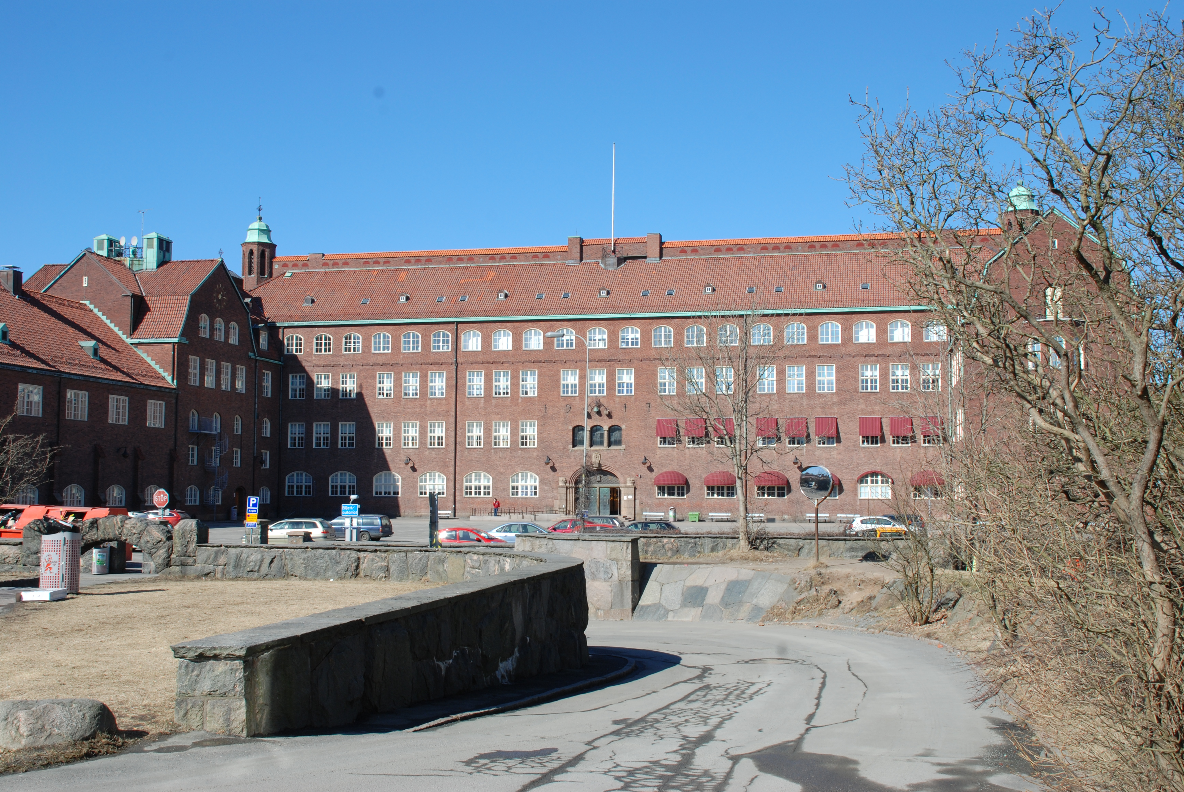 Hvitfeldtska gymnasiet - norra byggnaden.